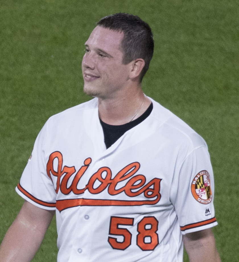 Yankees at Orioles 9/5/17